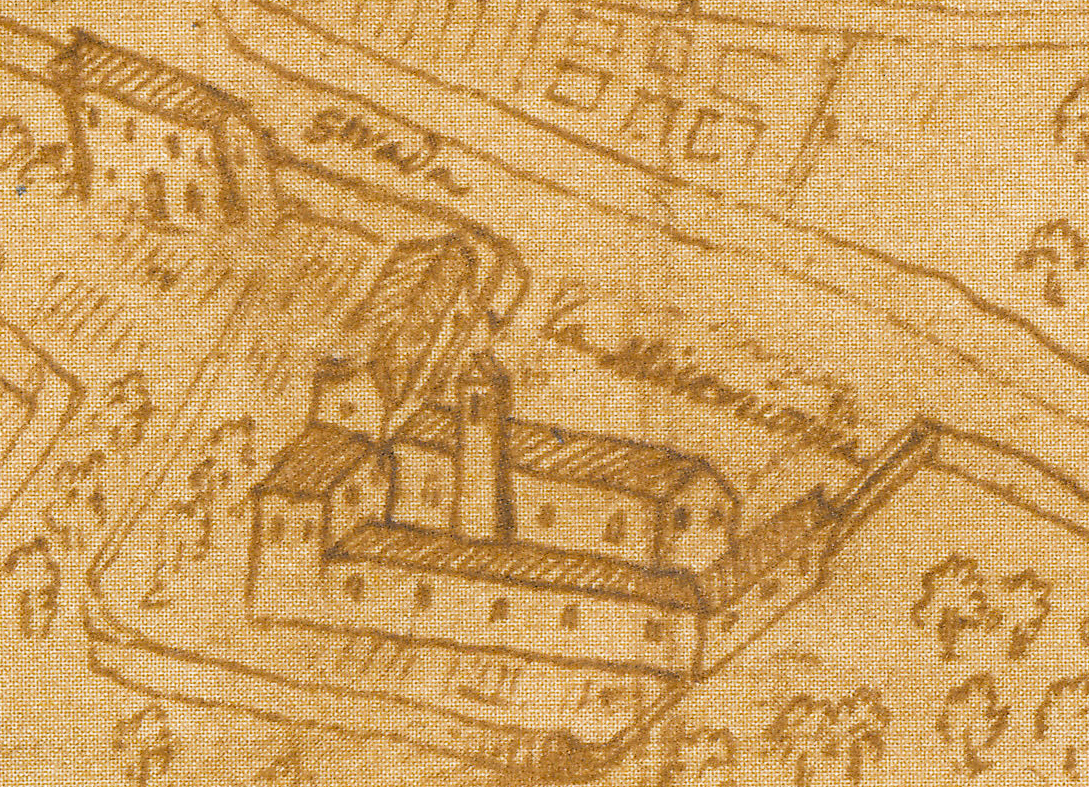 Vicenza - Pianta Angelica 1580 - particolare del Borgo Pusterla - Ospedale della Misericordia